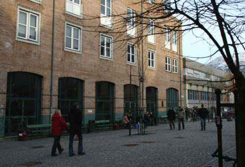 Det samfunnsvitenskapelige fakultet, Universitetet i Bergen, Fosswinckels gate 6.